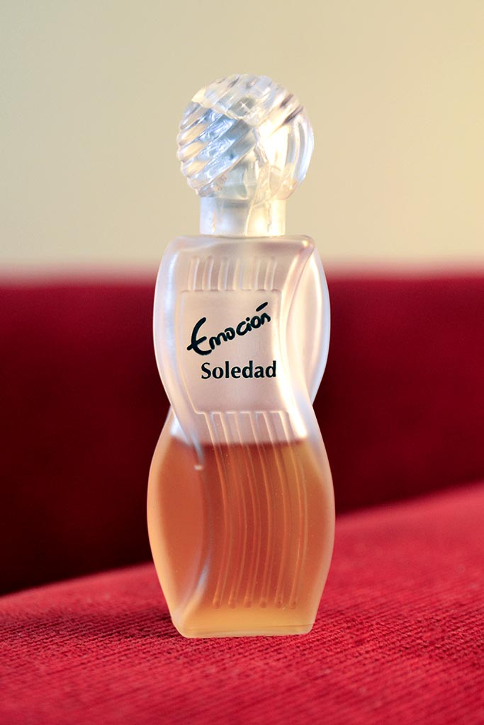 Perfume "Emoción" de Soledad Pastorutti